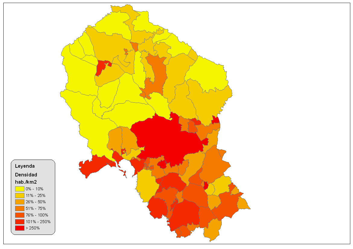 Mapa municipal de densidad de población en la provincia de Córdoba.